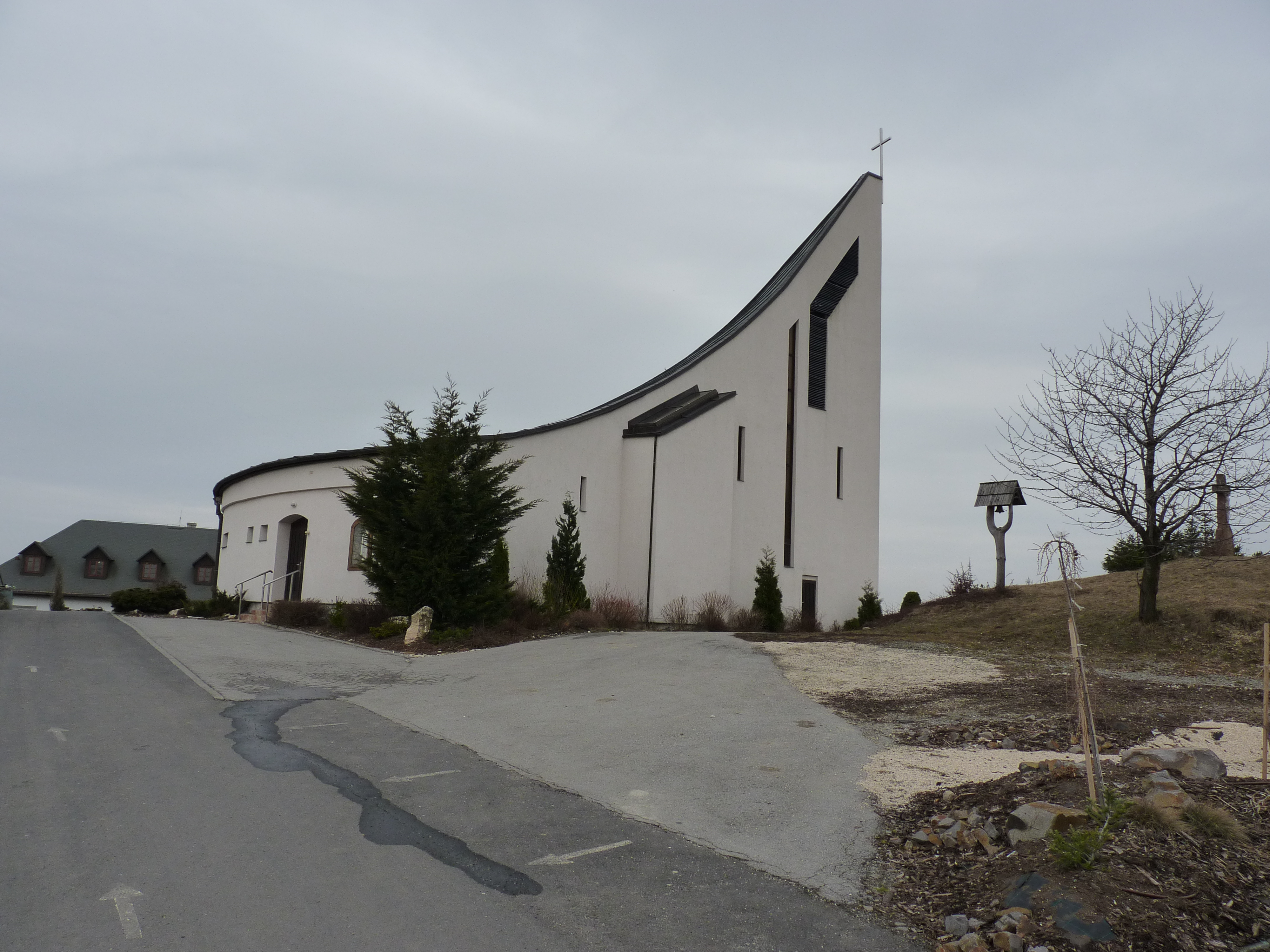 Obrázok kostola na Raticovom vrchu. Vyskytuje sa v Článku Kostol Raticov Vrch